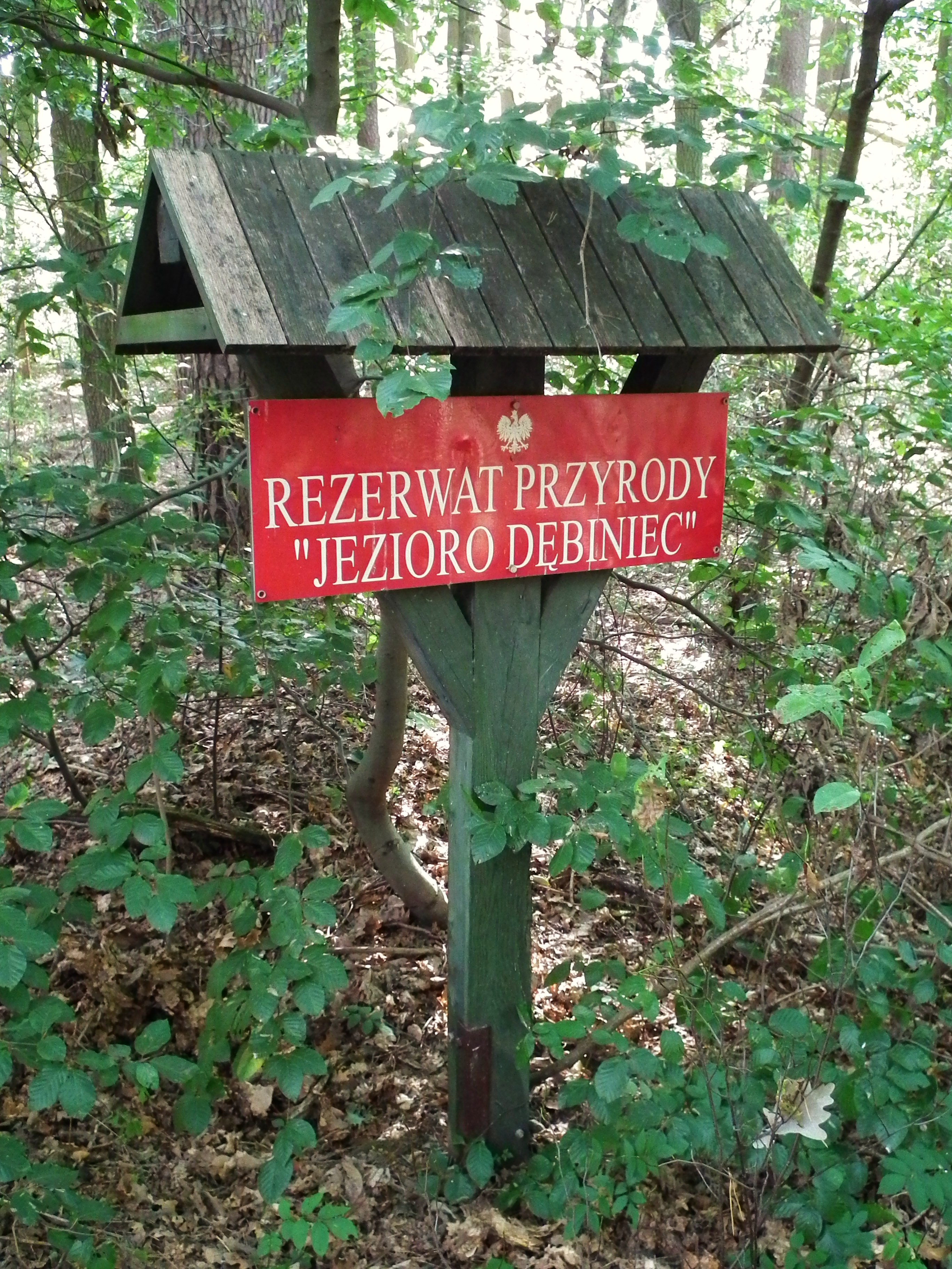 Rezerwat przyr. Jezioro Debiniec koło Promna.